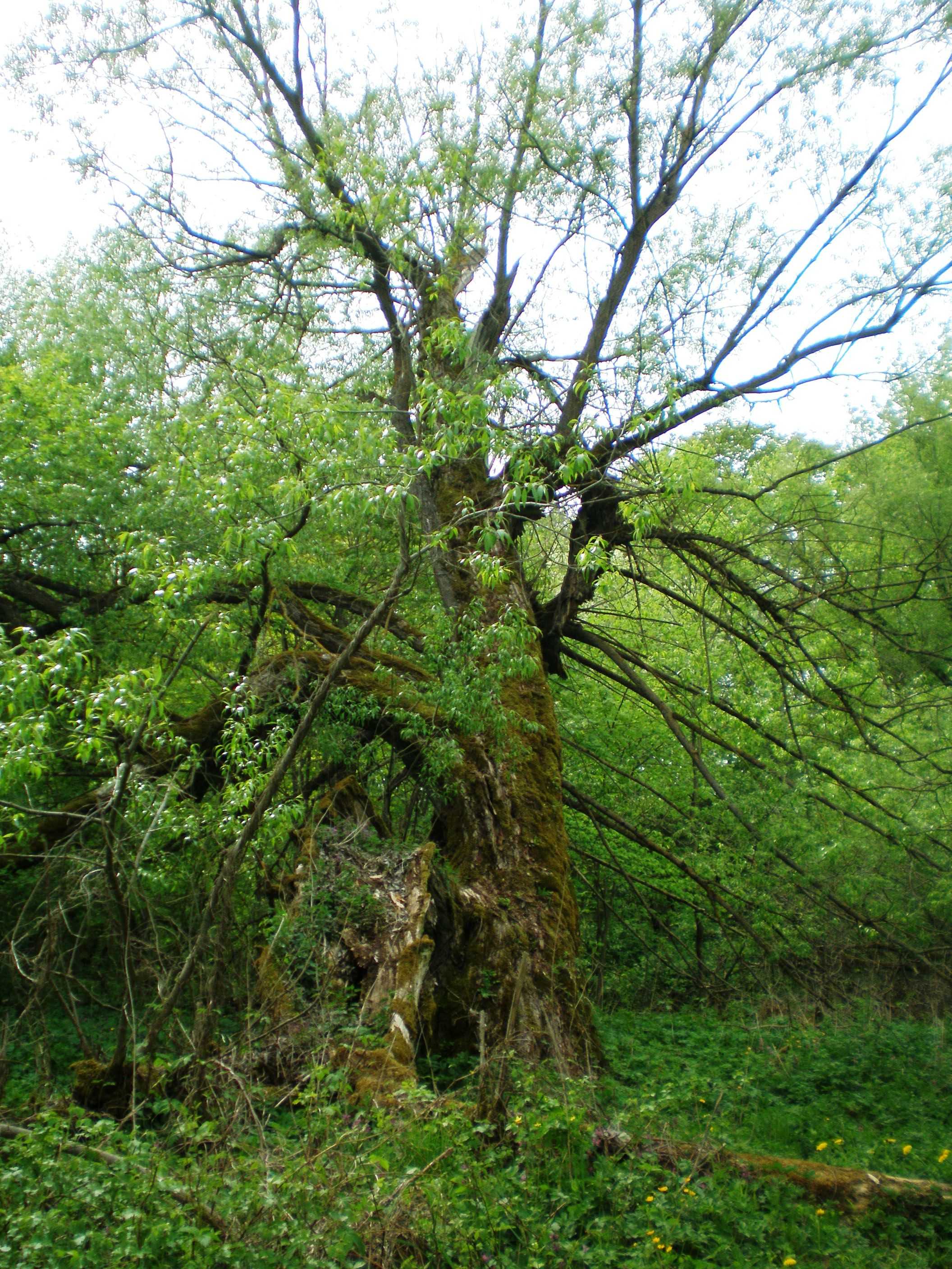 Senas gluosnis Pašušvyje, Kėdainių raj.